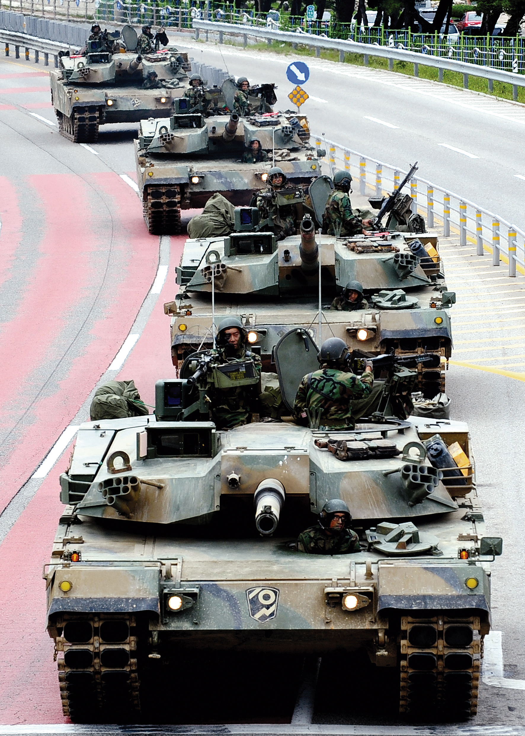 육군 102기갑여단의 K-1전차가 동해안 7번 국도를 이용해 전술집결지로 이동하고 있따. 부대는 1일부터 3일까지 강원도 고성·속초·양양 일대에서 야전군전투지휘검열 중 K1전차 탄약적재 훈련을 한 뒤 야외기동훈련을 진행했다. 촬영 - 김태형 기자